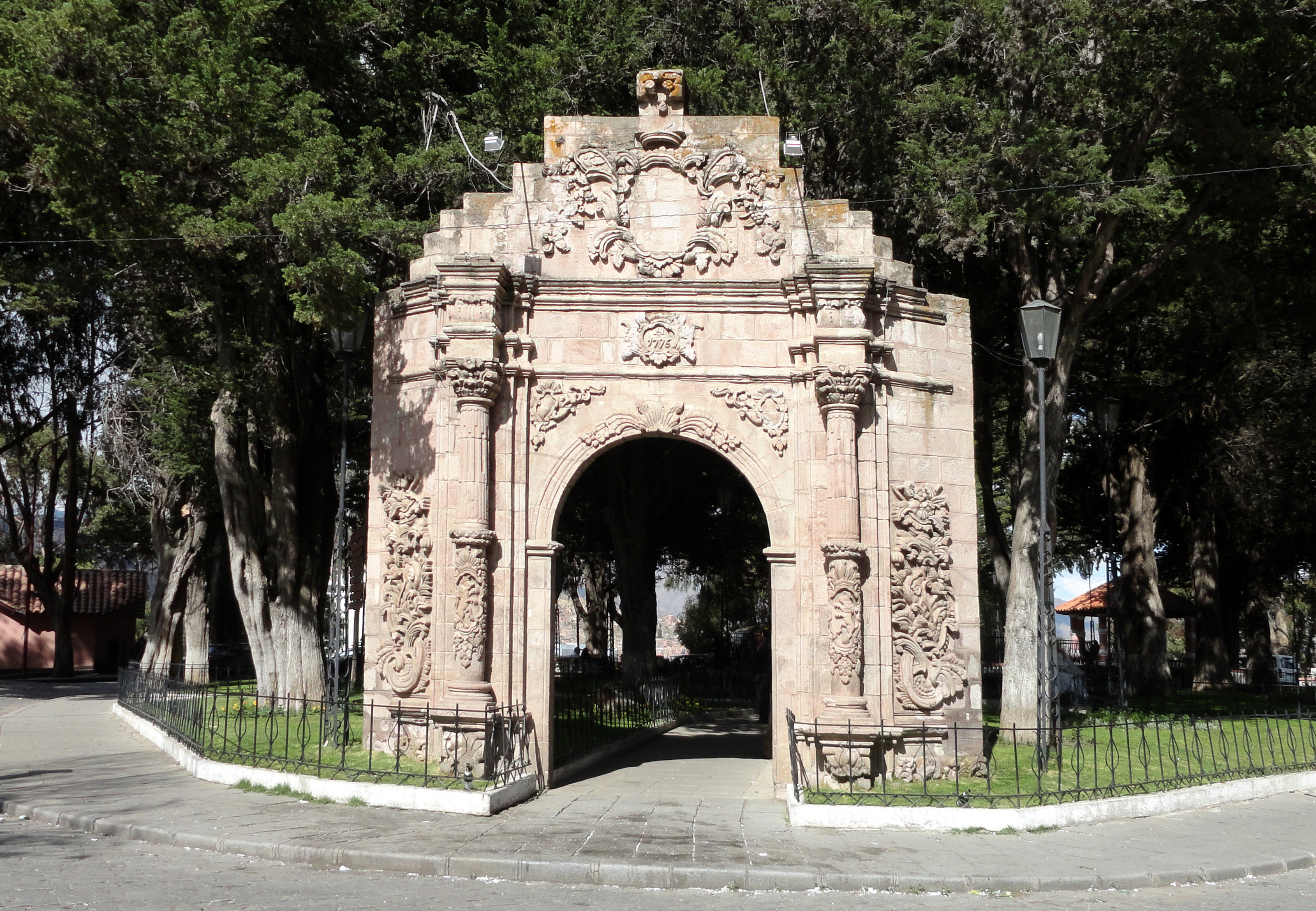 Arco del Montículo This medium shows the protected monument with the number L/00-205 in Bolivia.